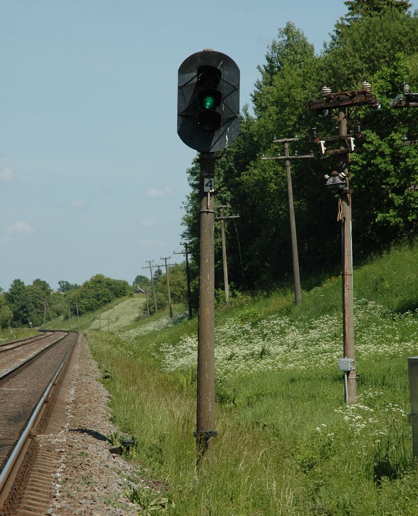 Návěstidlo automatického bloku, úsek Jiesia - Mauručiai, Litva